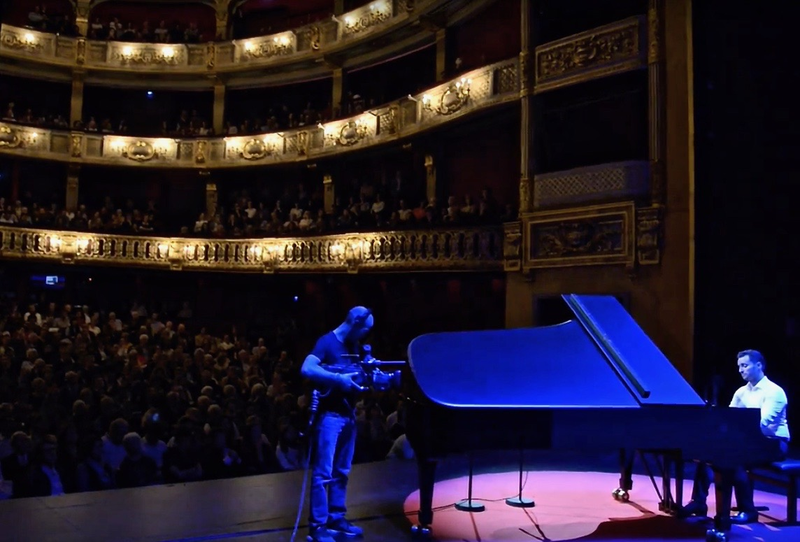 Le pianiste Axel Hatchuel en concert au Théatre de l'Odéon, le 5 octobre 2019.